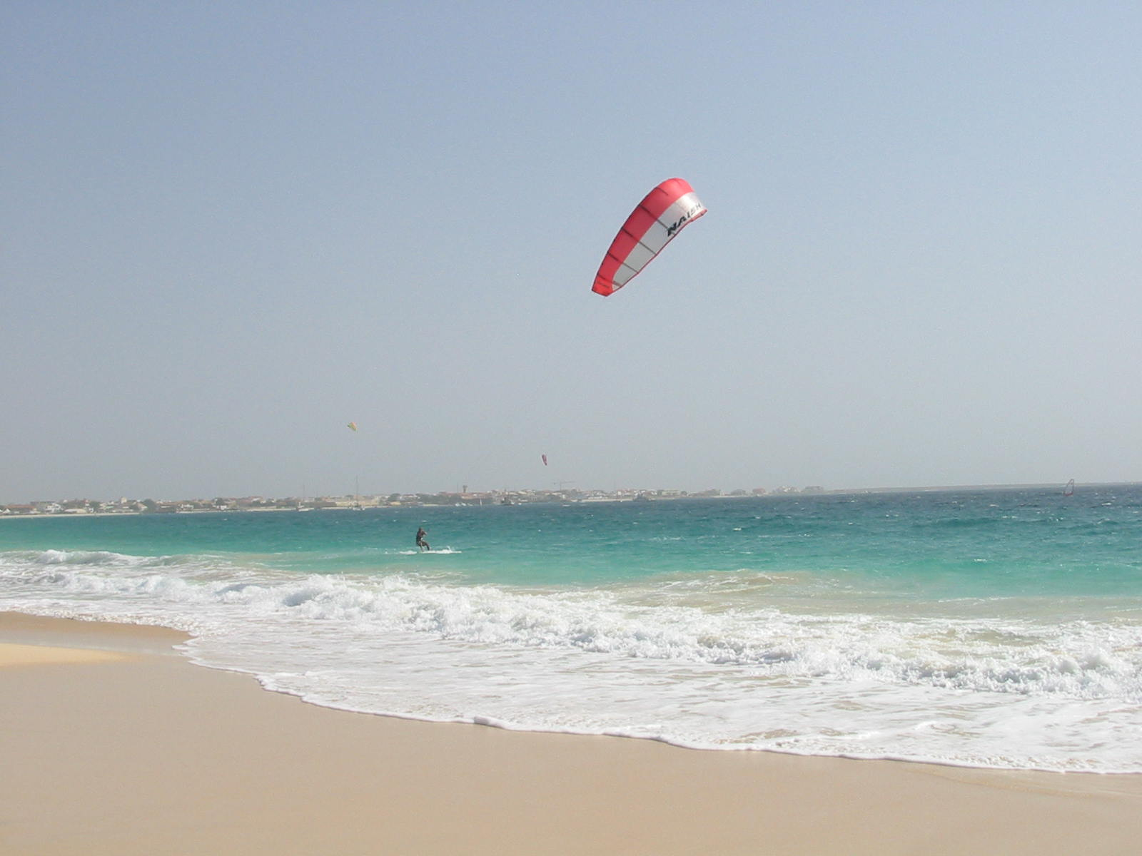 sal cape verde santa maria